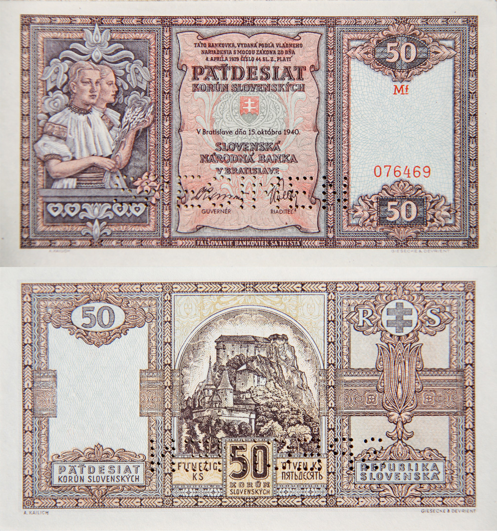 50 korún slovenských vojnovej Slovenskej republiky z roku 1940. Päťdesiatkorunáčka. Averz: V ornamentálnom orámovaní v strede nápis TÁTO BANKOVKA, VYDANÁ PODĽA VLÁDNEHO / NARIADENIA S MOCOU ZÁKONA ZO DŇA / 4. APRÍLA 1939 ČÍSLO 44 SL. Z. PLATÍ / PÄŤDESIAT / KORÚN SLOVENSKÝCH. Uprostred je slovenský štátny znak a pod ním nápis: V BRATISLAVE. Dňa 15. októbra 1940 / SLOVENSKÁ / NÁRODNÁ BANKA / V BRATISLAVE… Vpravo figurálna vodotlač predstavujúca hlavu ženy z profilu. Vľavo dve ženské postavy s obilnými klasmi v rukách. Reverz: v ornamentálnom orámovaní v strede Oravský zámok a pod ním označenie hodnoty číslicou 50. Vpravo hore dvojramenný kríž po stranách s písmenami R – S. Dole nápis REPUBLIKA / SLOVENKA. Vľavo vodotlač a označenie hodnoty.